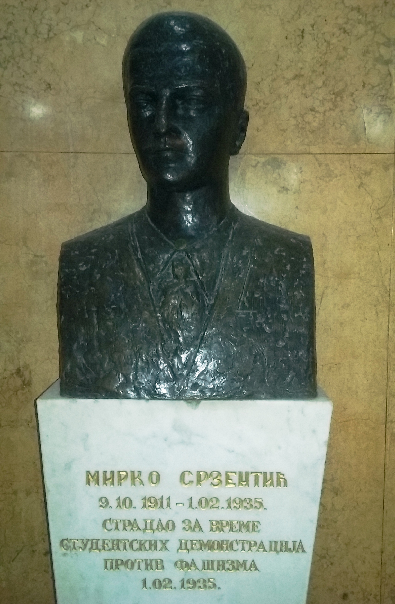 Спомен биста Мирка Срзентића у холу зграде Филолошког факултета у Београду, у којој је пре 1940. године био смештен Правни факултет.